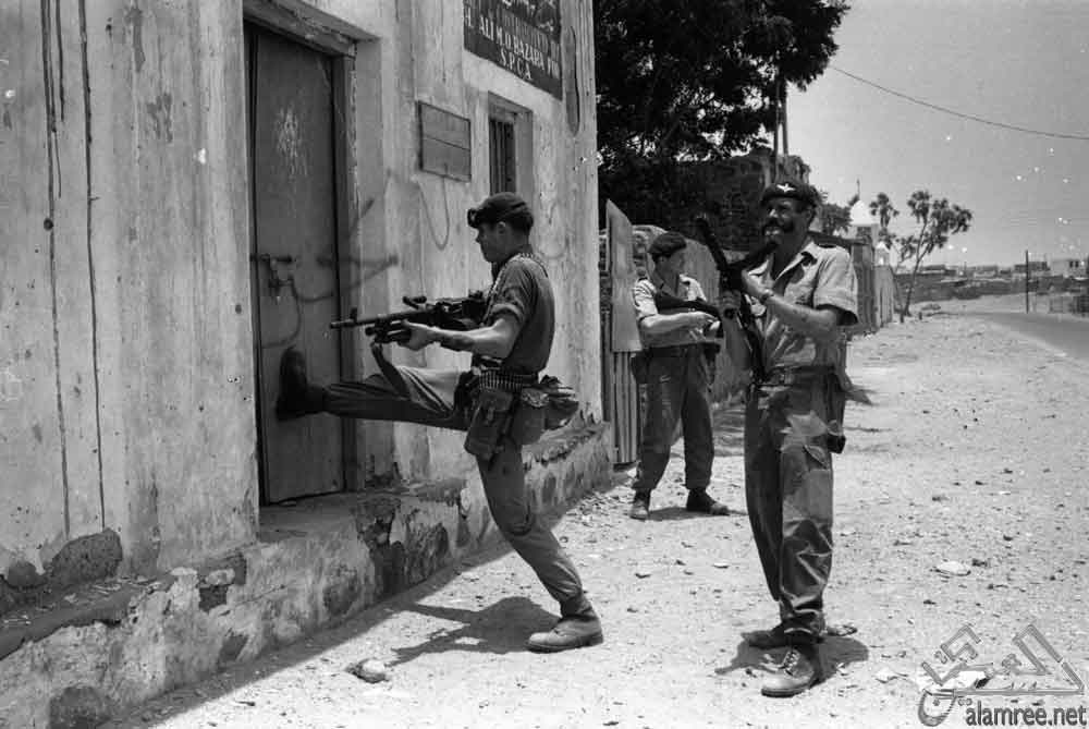 حملات دهم وتفتيش عدن 1965